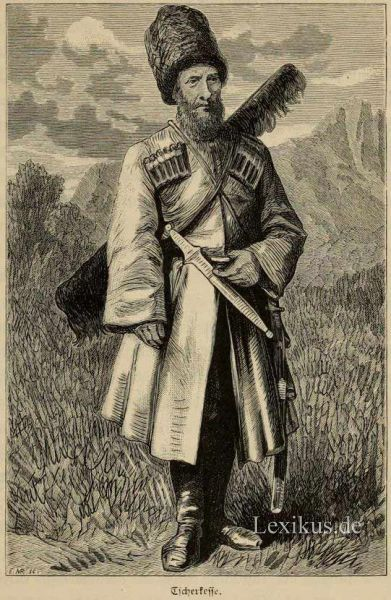 Tscherkesse – Reise auf dem Kaspischen Meere und in den Kaukasus. Band 2 Unternommen in den Jahren 1825 — 1826